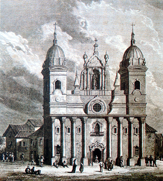 Aônimo do século XIX. Catedral de Belém do Pará, Brasil.